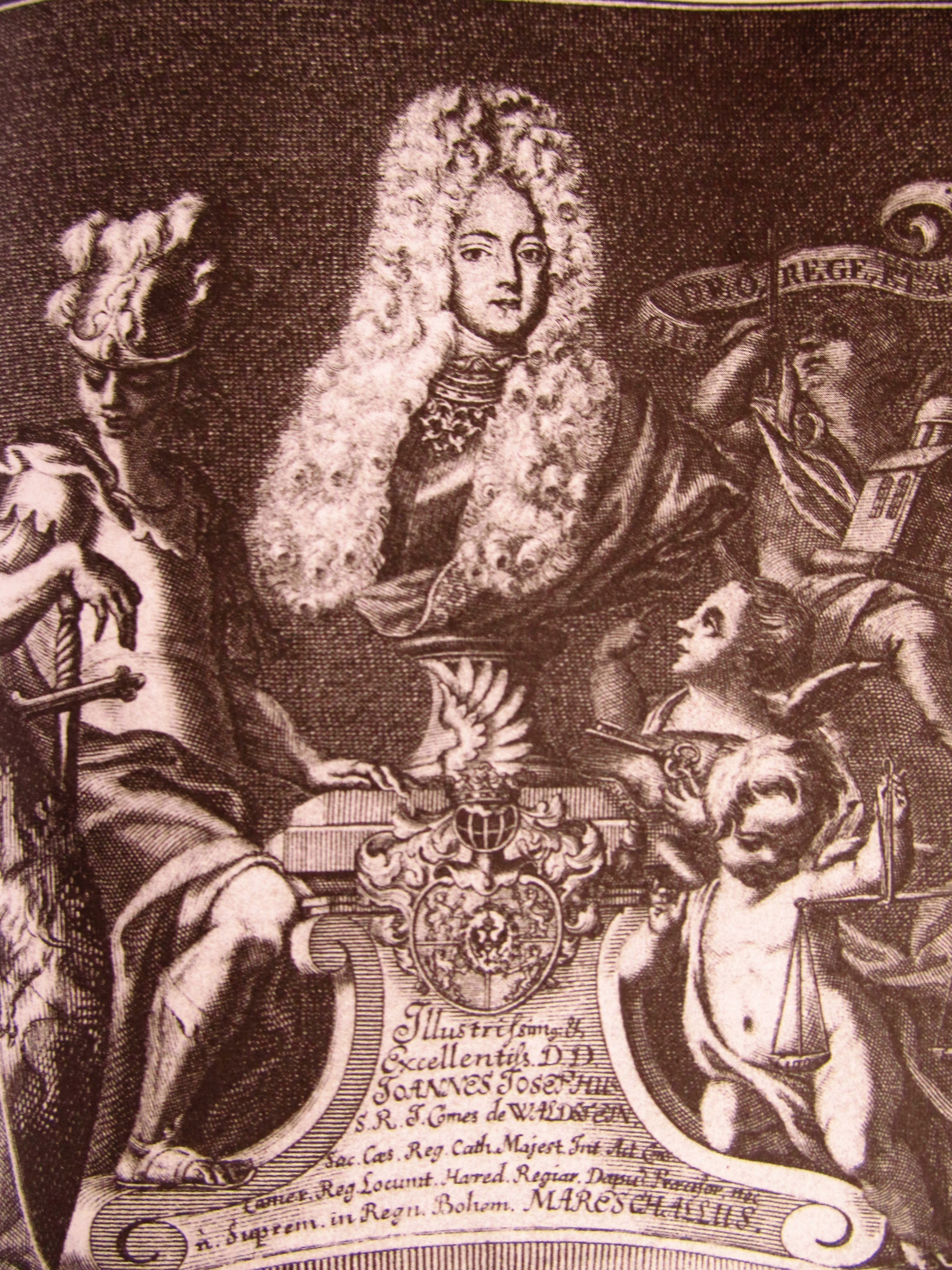 Hrabě Jan Josef z Valdštejna (1684-1731), nejvyšší maršálek Království Českého